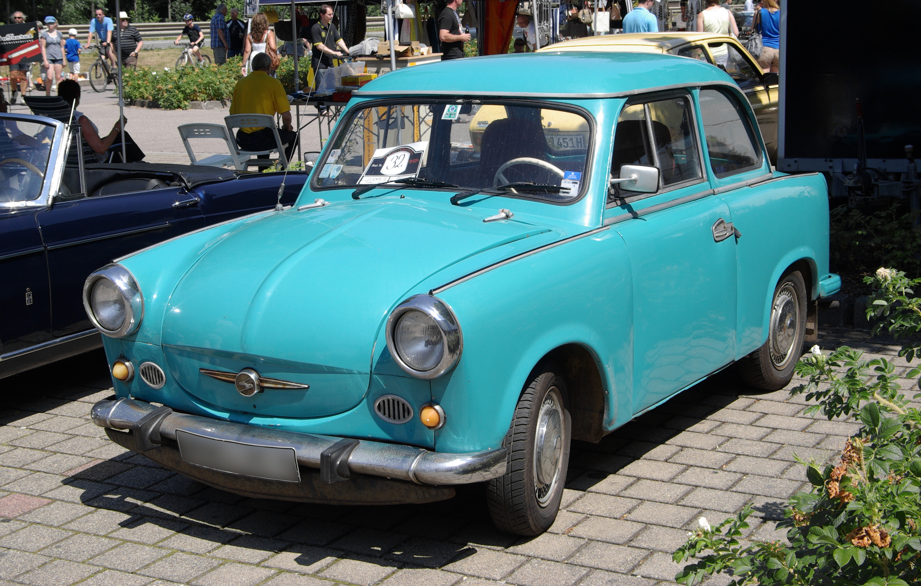 VEB Sachsenring Trabant 500, 1960, 18 PS, 29. Internationales Oldtimer Treffen Konz